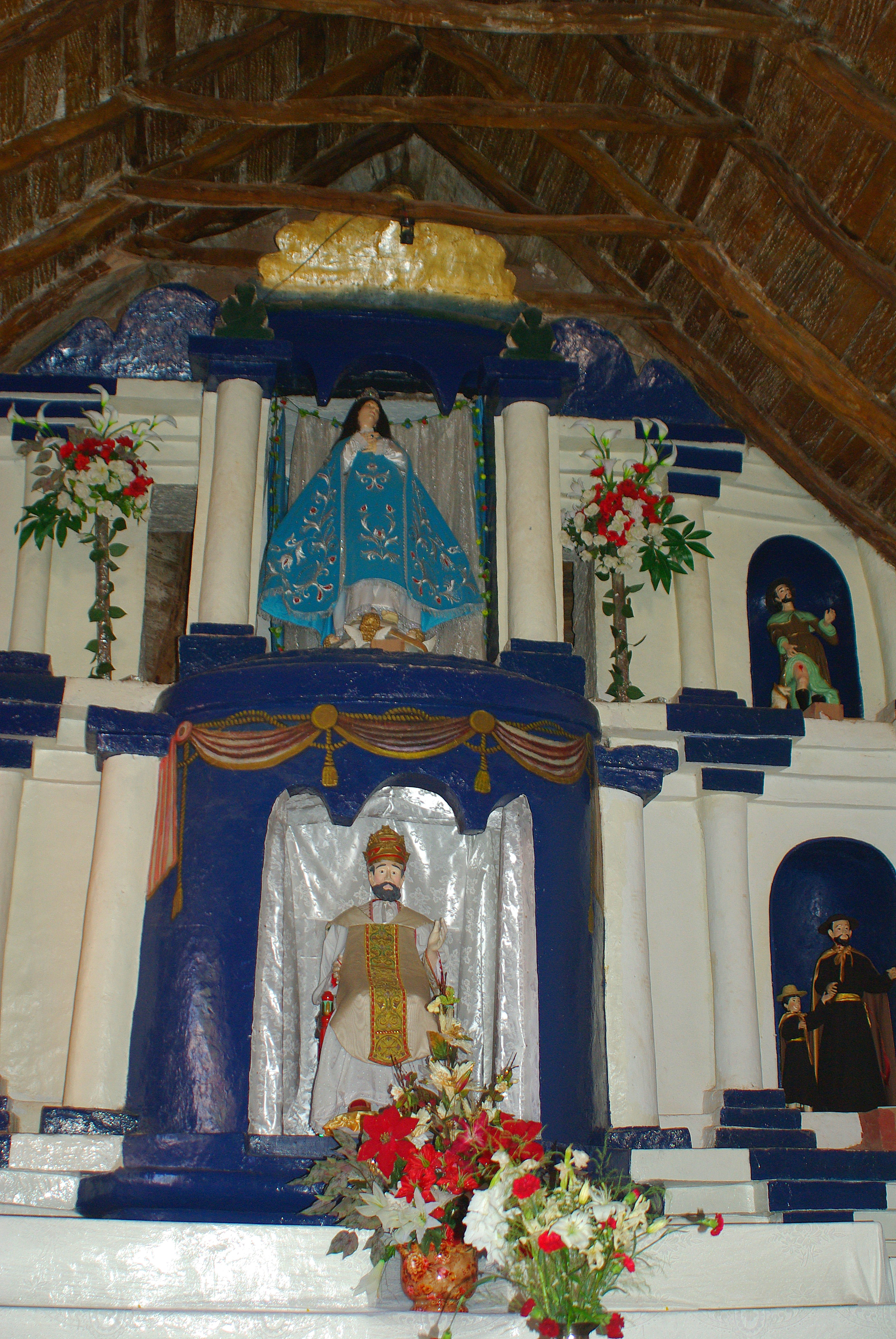 Altar de la iglesia de San Pedro, San Pedro de Atacama, abril de 2010